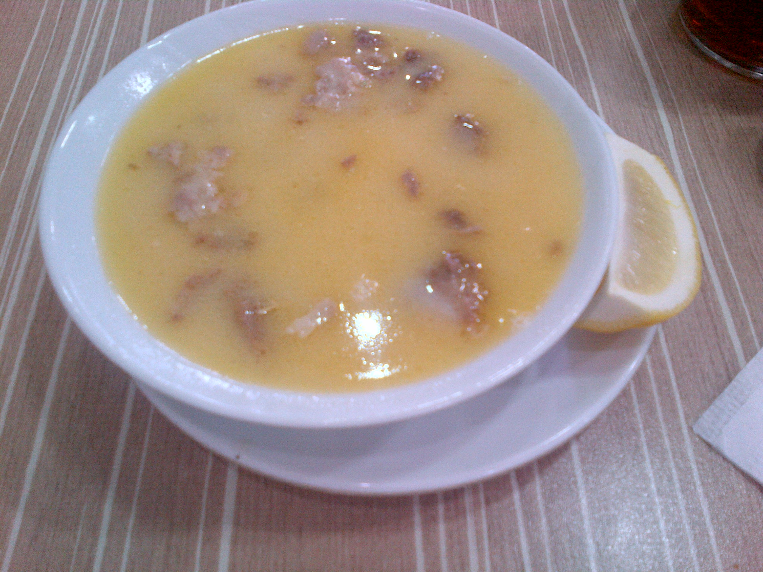 Sopa de lengua (de vaca) en Turquia.